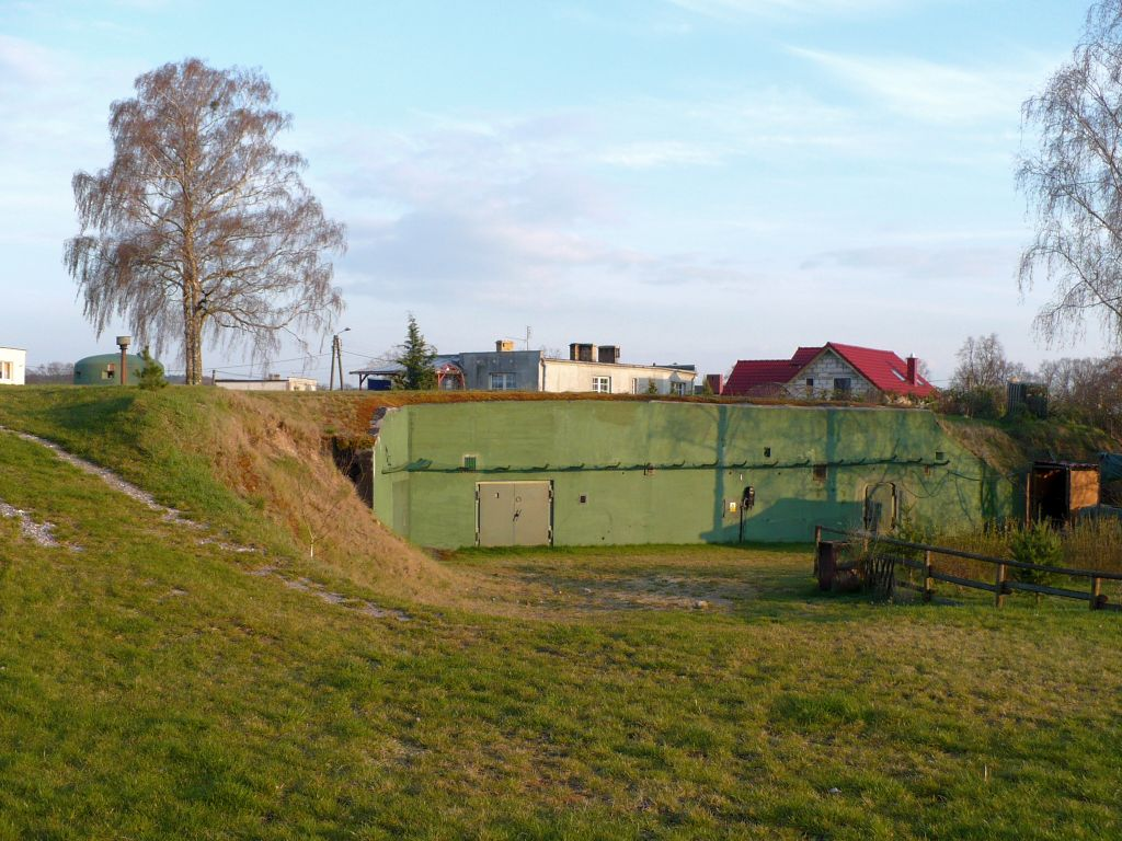 Odrestaurowany bunkier na połnocnym krańcu wsi.